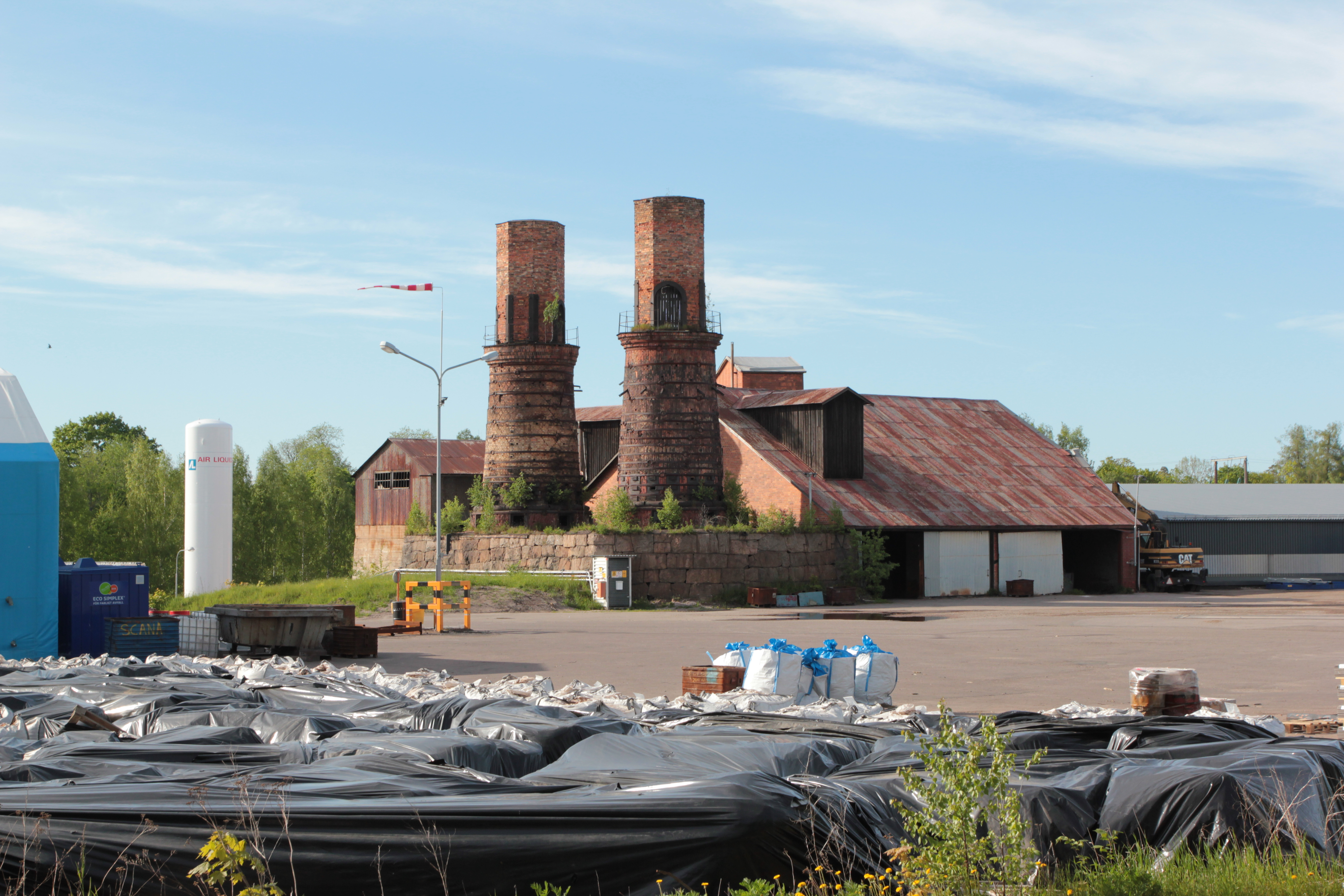 Söderfors bruk. Foto uppladdat som en del i Bergslagssafarin 26 maj 2012.